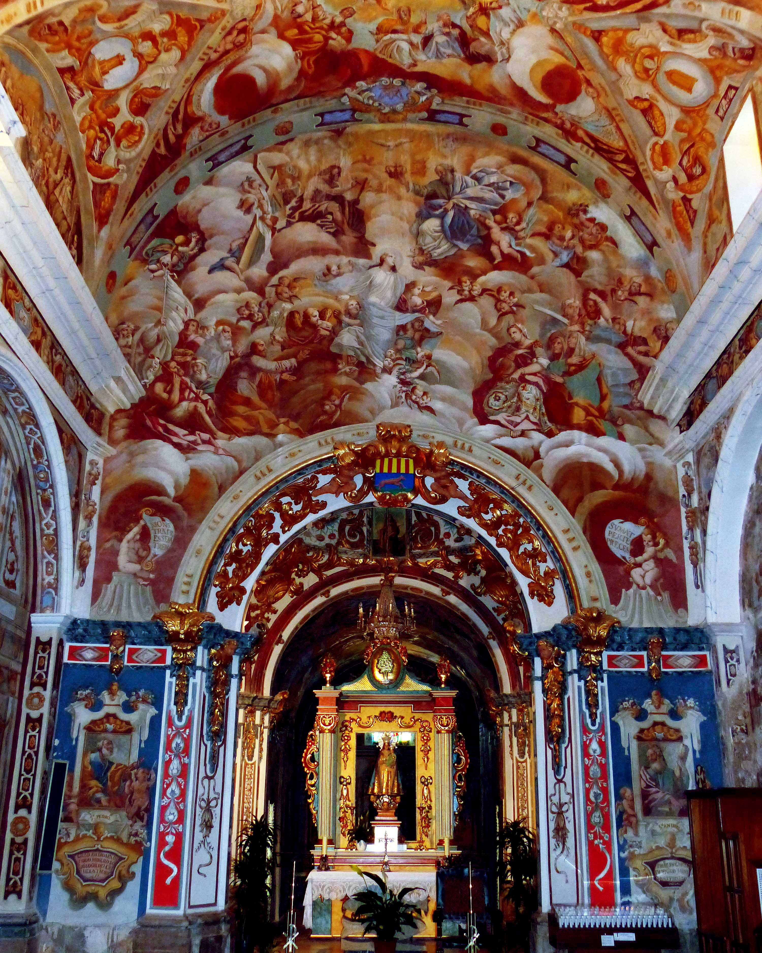 Pinturas del pintor Pascual Mespletera realizadas en el Santuario de la Virgen de l'Avellà de Catí